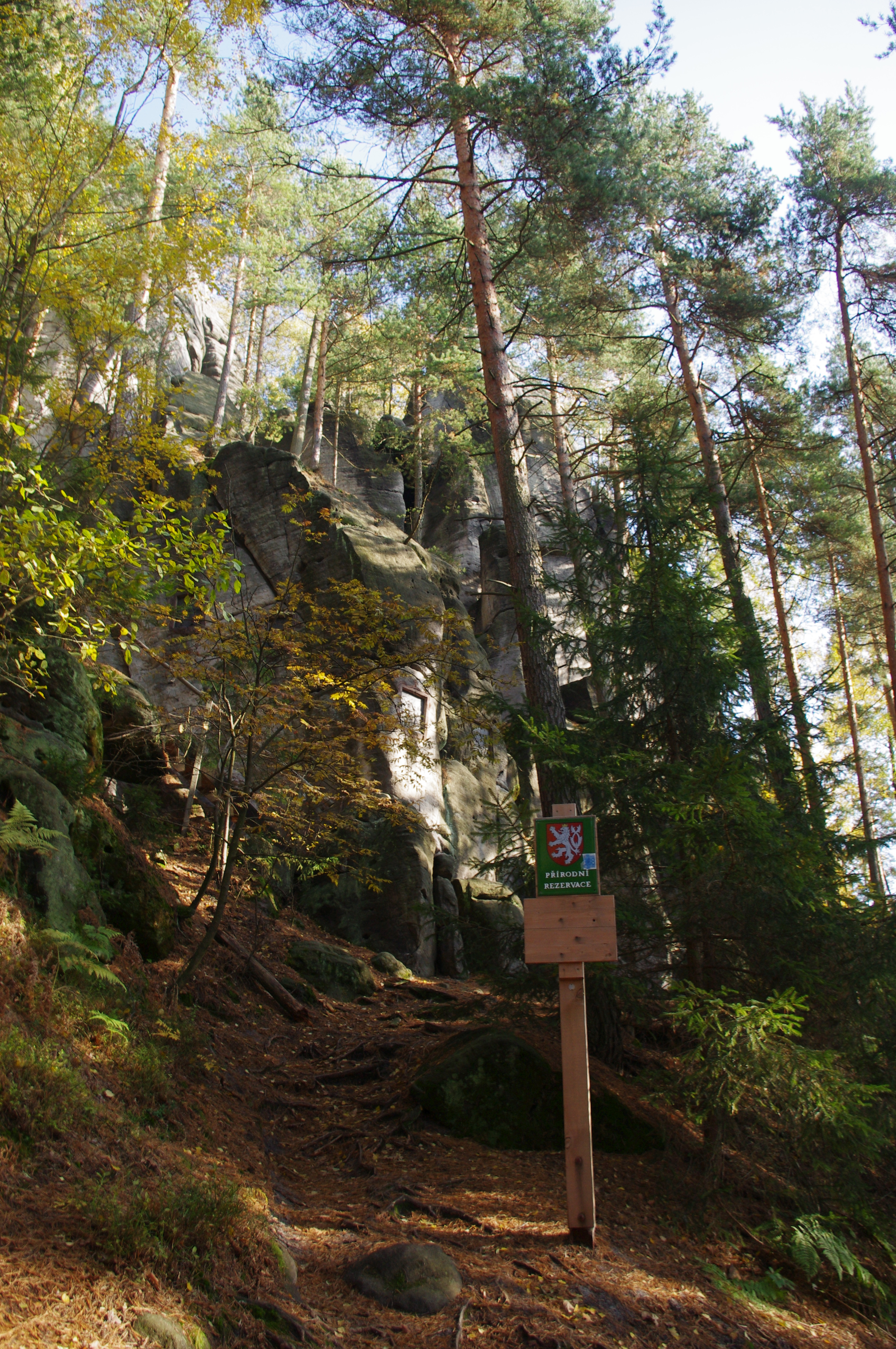 Vstup do PR po zelené turistické značce